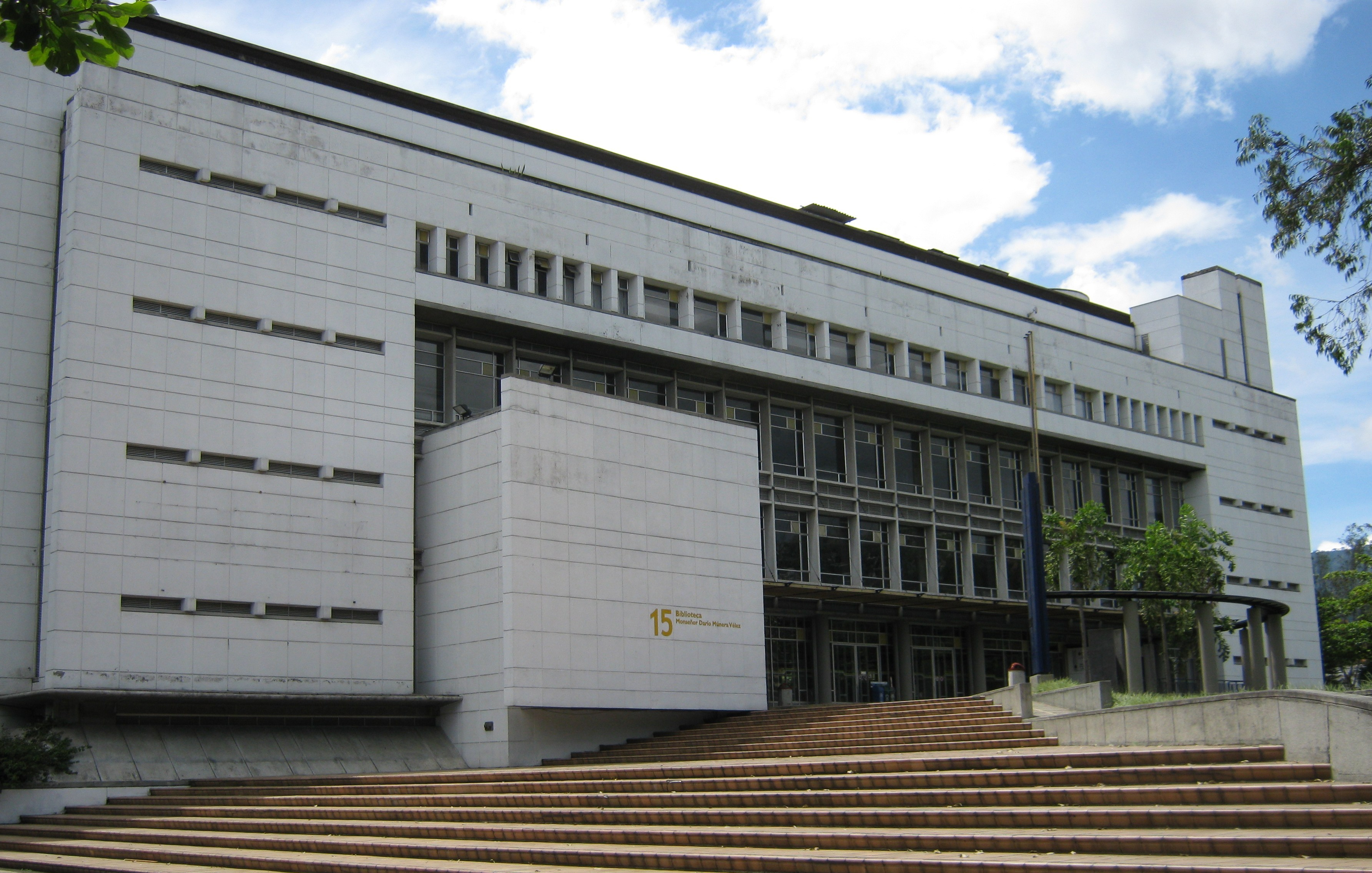 Biblioteca Central, Universidad Pontificia Bolivariana, Medellín, Colombia.